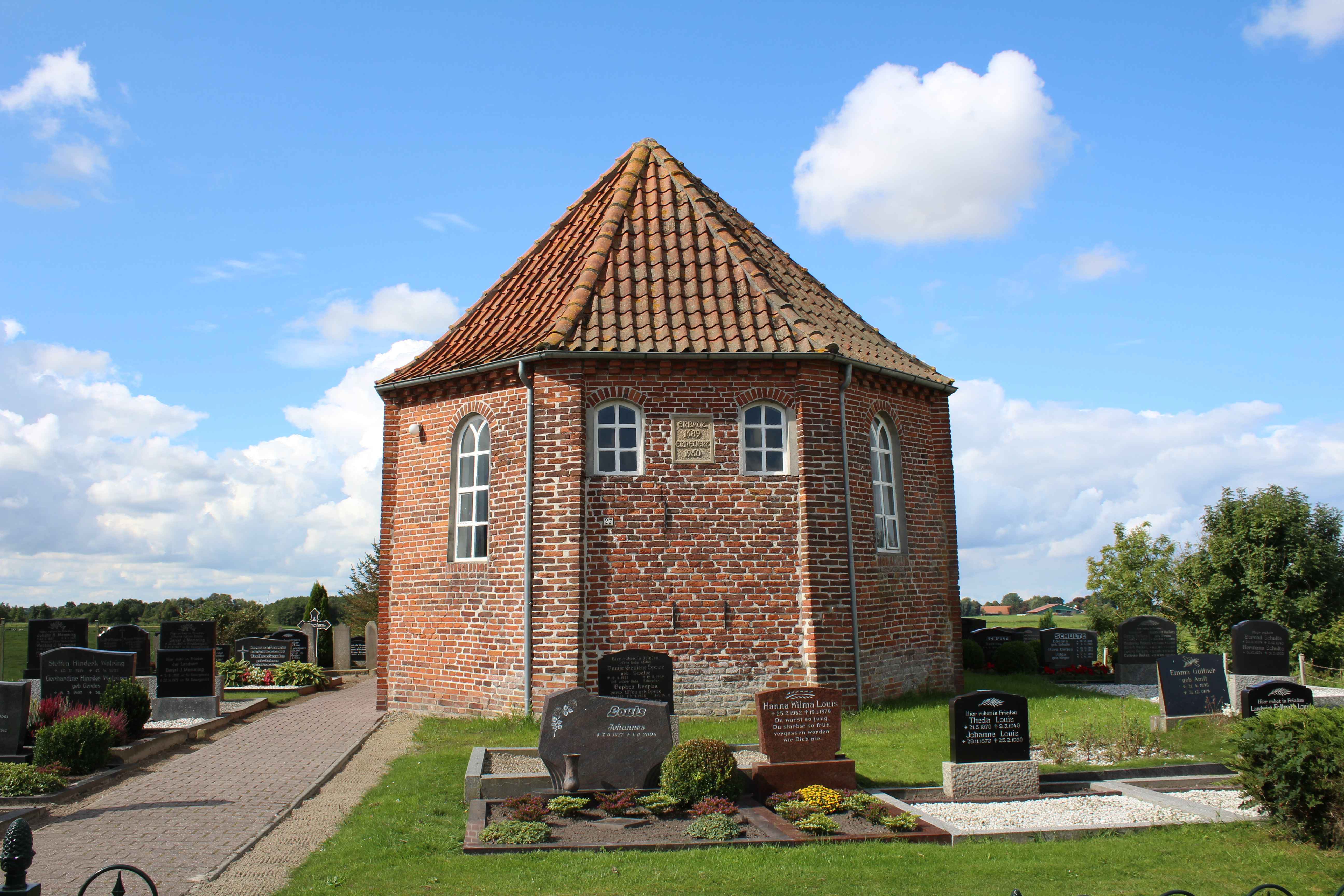 Ev.-reformierte Kirche St. Georgiwold, Gemeinde Weener, Landkreis Leer, Ostfriesland, Deutschland